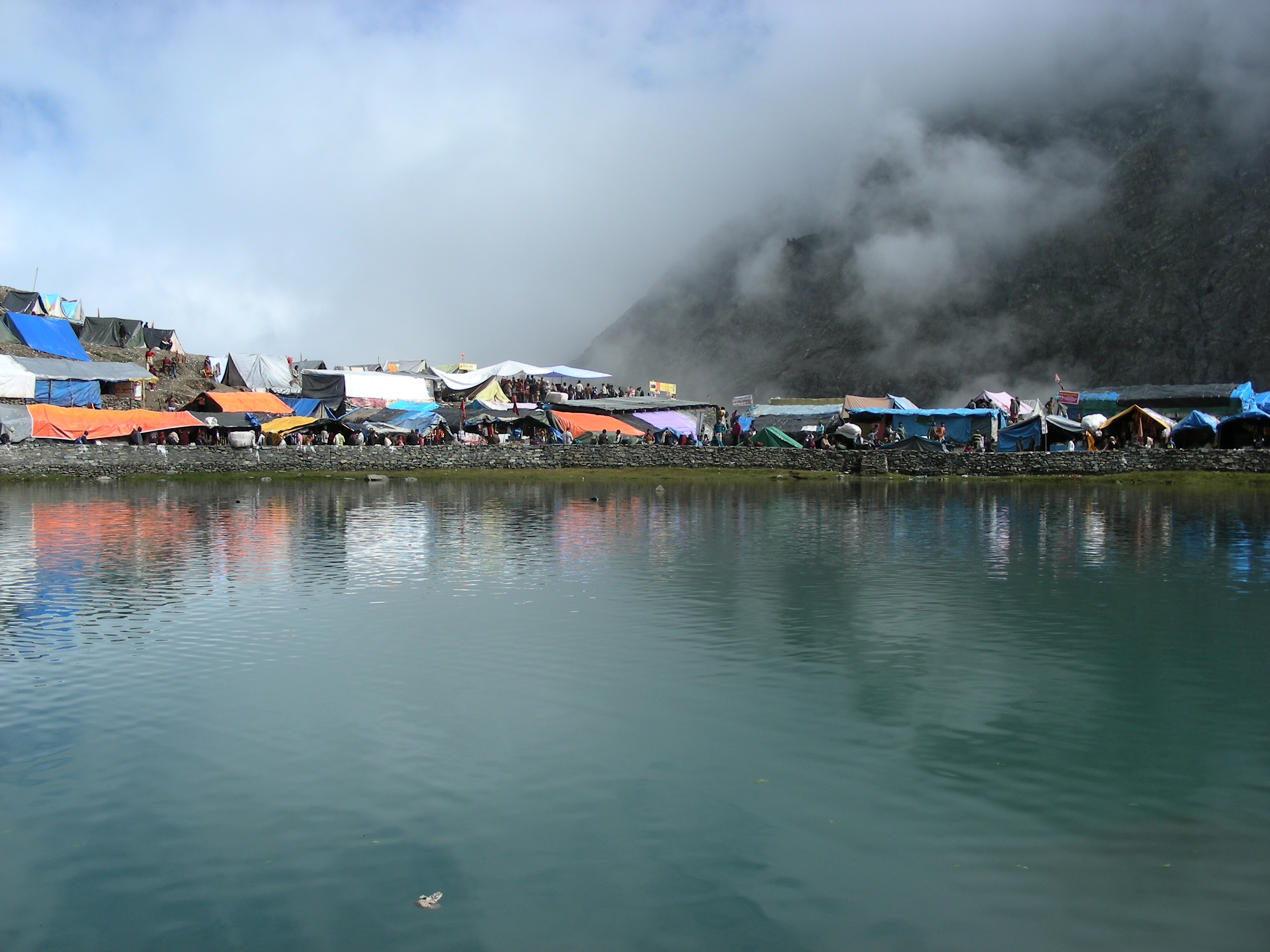 Manimahesh lake